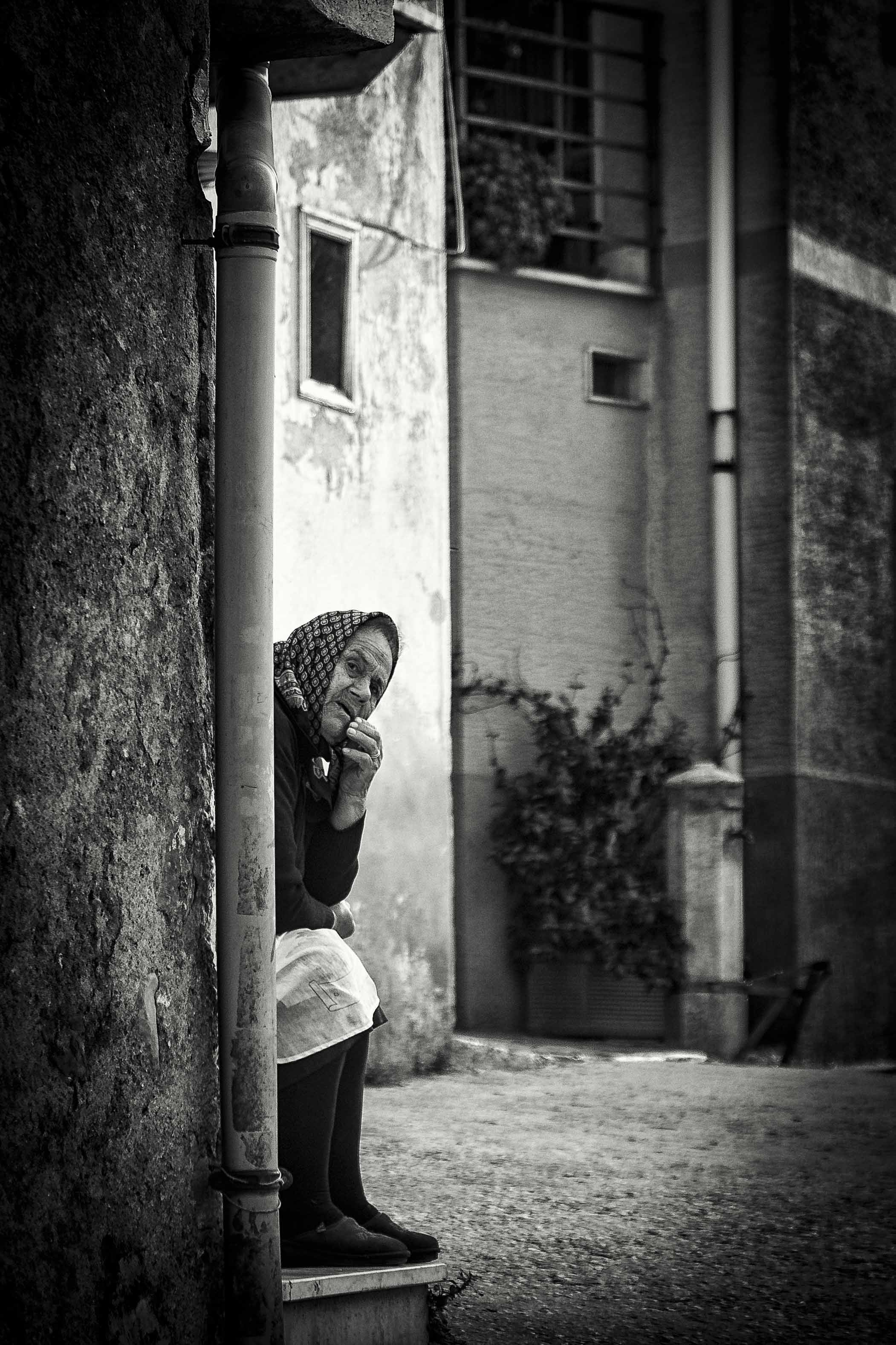 Vicolo Convento